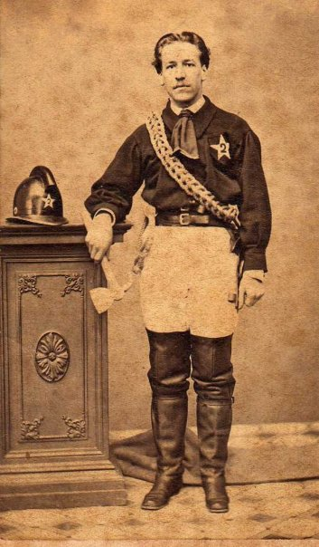 Fotografía del Capitán Alberto Nebel Ovalle, vistiendo el uniforme de la 2ª Cía. de Bomberos de Valparaíso. El Capitan Nebel envío esta foto desde La Serena a su familia en Valparaíso. Al reverso se lee: A mis queridos hermanos Carlos y Teresa. Su hermano Alberto Nebel Serena Noviembre 5/79